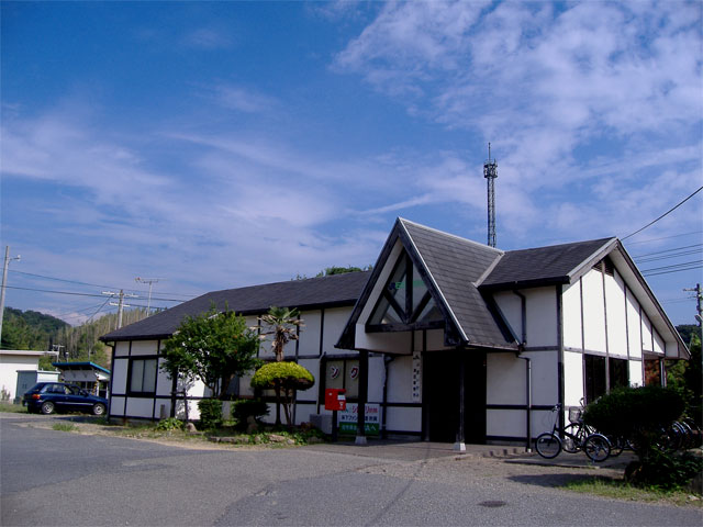 2005年8月 投稿者撮影